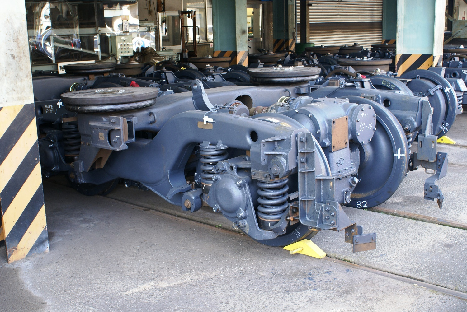 小倉工場にて撮影